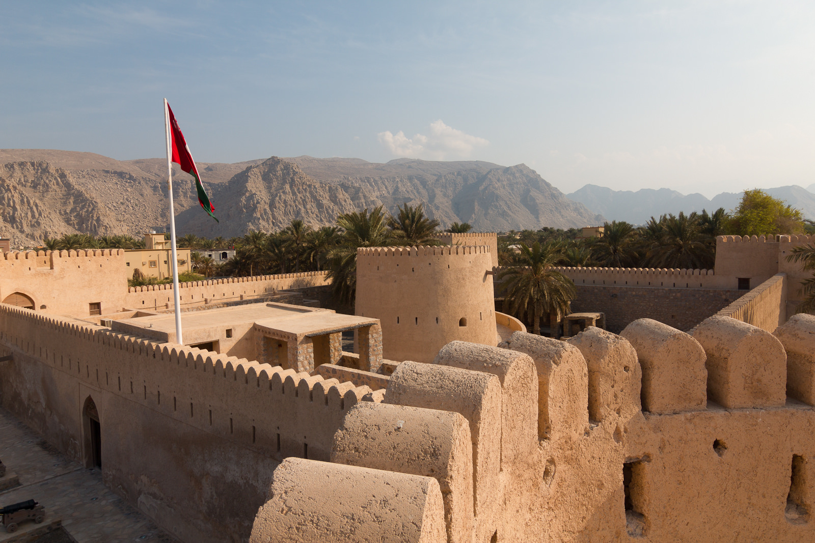 Khasab, Musandam Peninsula.